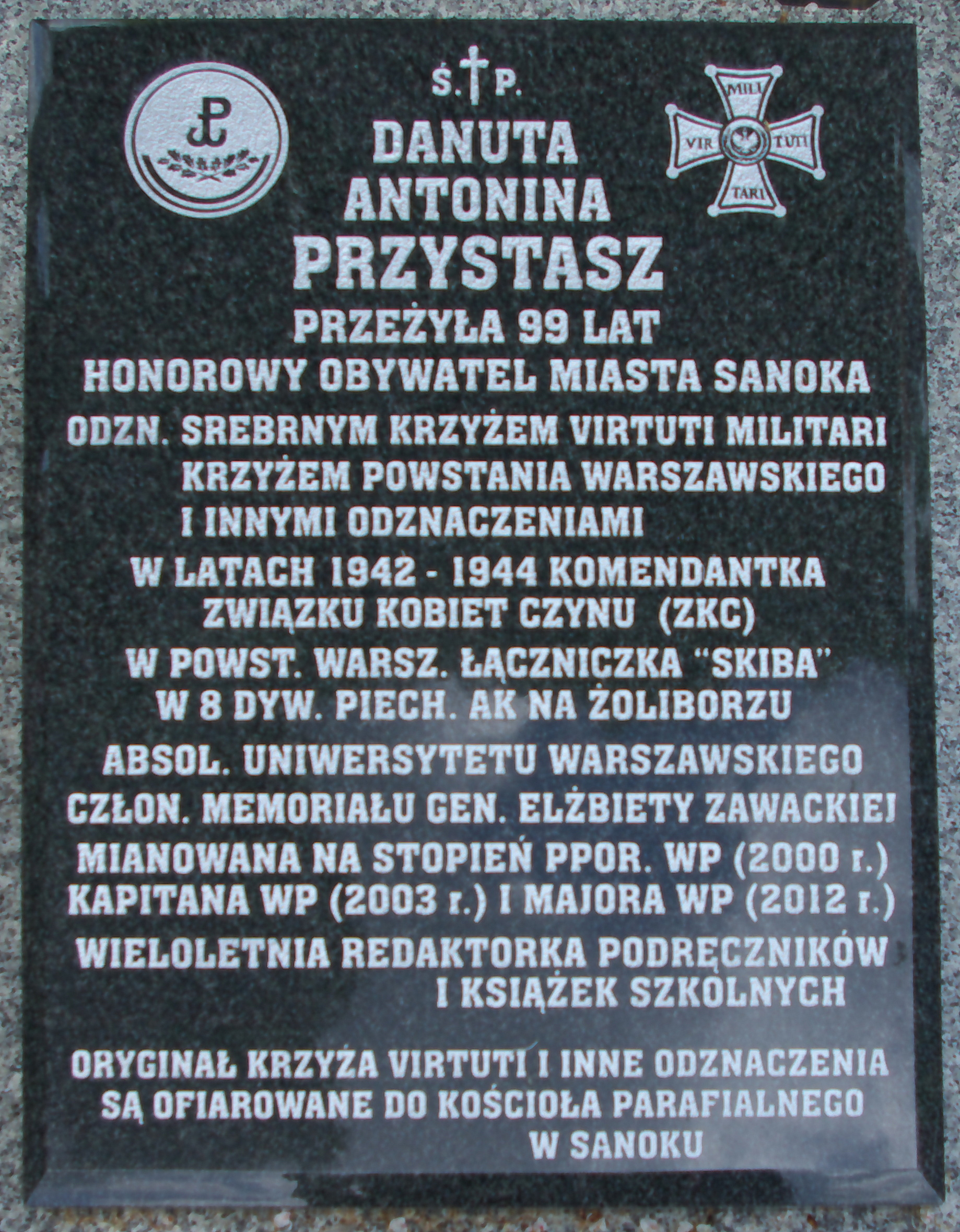 Grobowiec Przystaszów i Czerwińskich na Cmentarzu Centralnym w Sanoku. Tablica upamiętniająca mjr Danutę Przystasz.